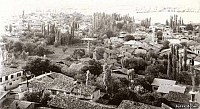 Եվդոկիա(Թոքաթ)